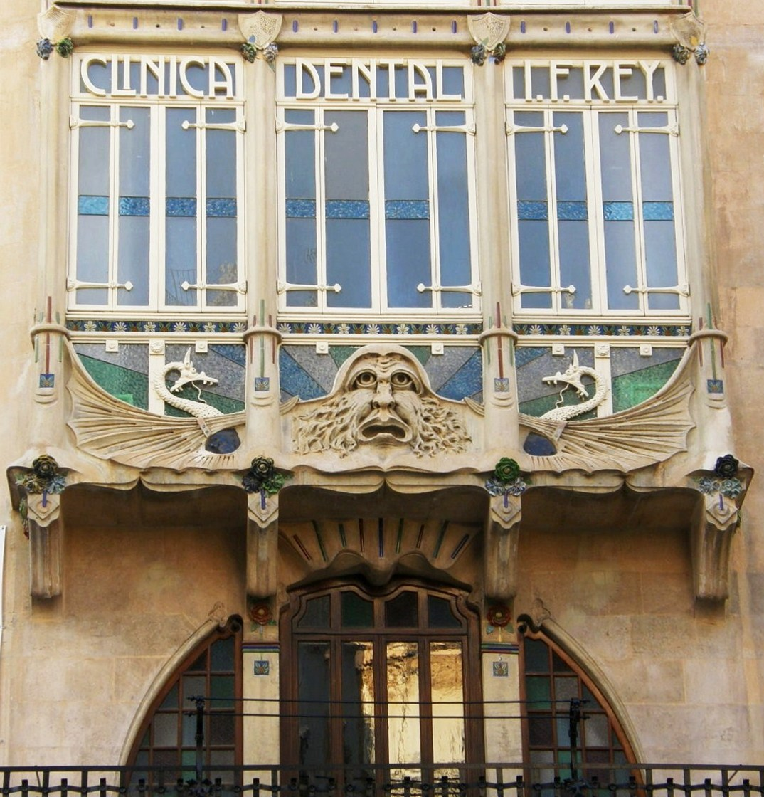 Edificio modernista influenciado por el modernismo catalán, de 1909. Palma de Mallorca - Islas Baleares - España